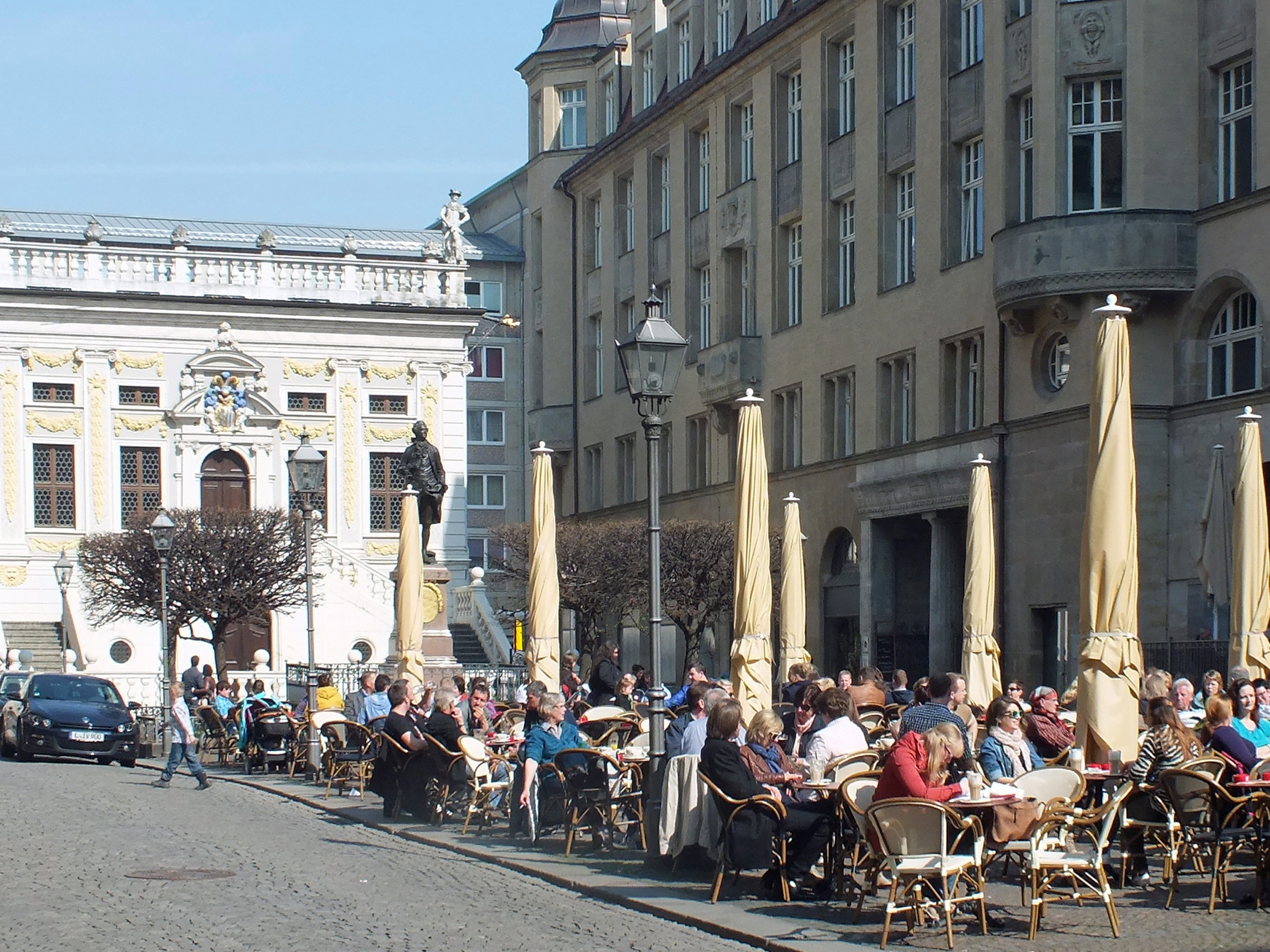 Vorfrühling auf dem Naschmarkt in Leipzig